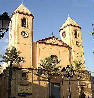 Iglesia de Nuestra Señora de la Asunción (Villanueva del Río Segura)